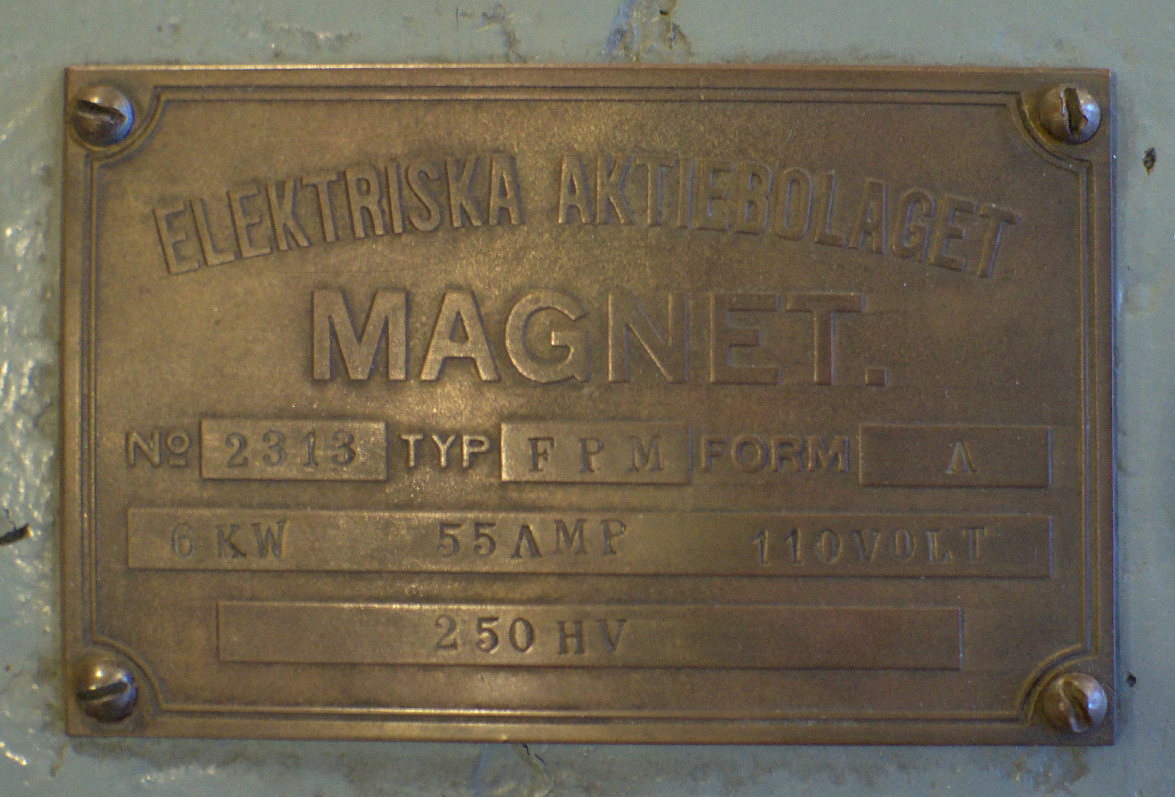 Typskylt för Elektriska aktiebolagets "Magnet" i Eskilstuna stadsmuseum.